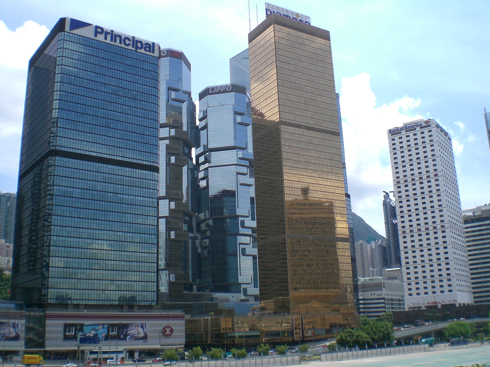 美國銀行中心、遠東金融中心、力寶中心及海富中心外觀